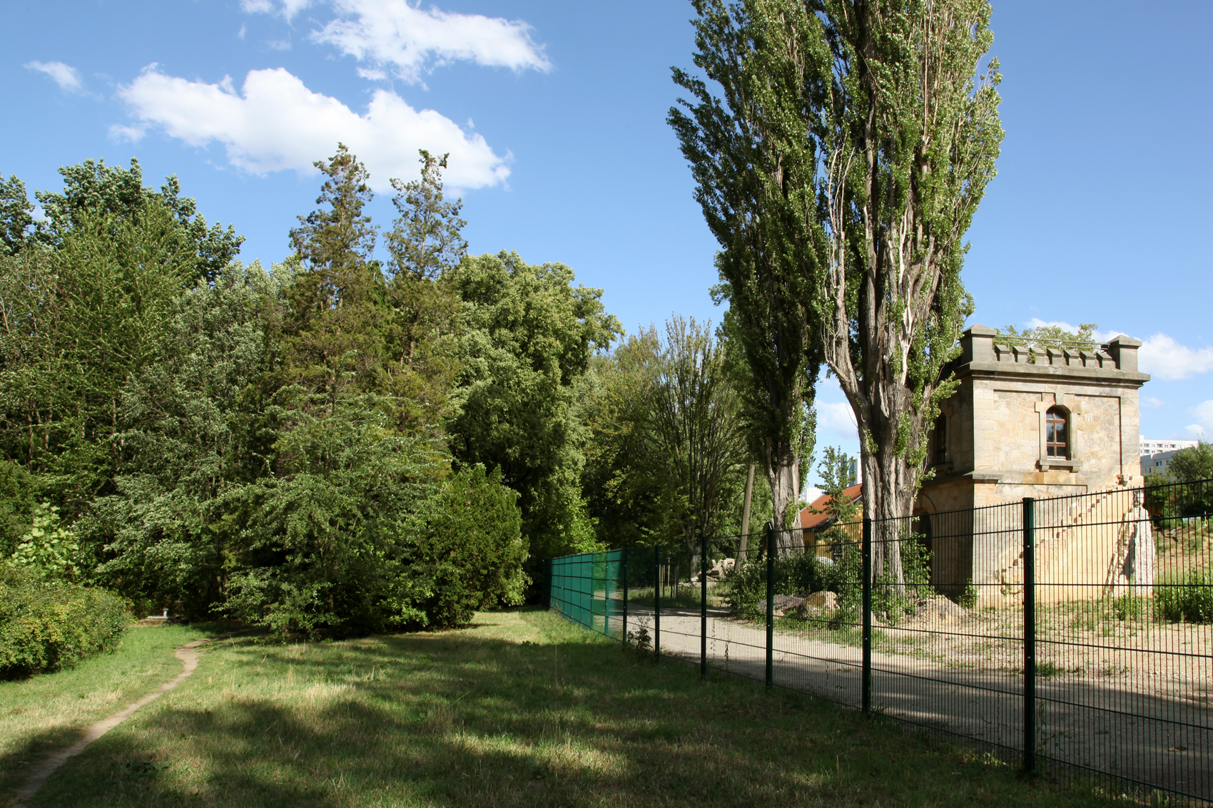 Volkspark Räcknitz, "DREWAG-Turm"